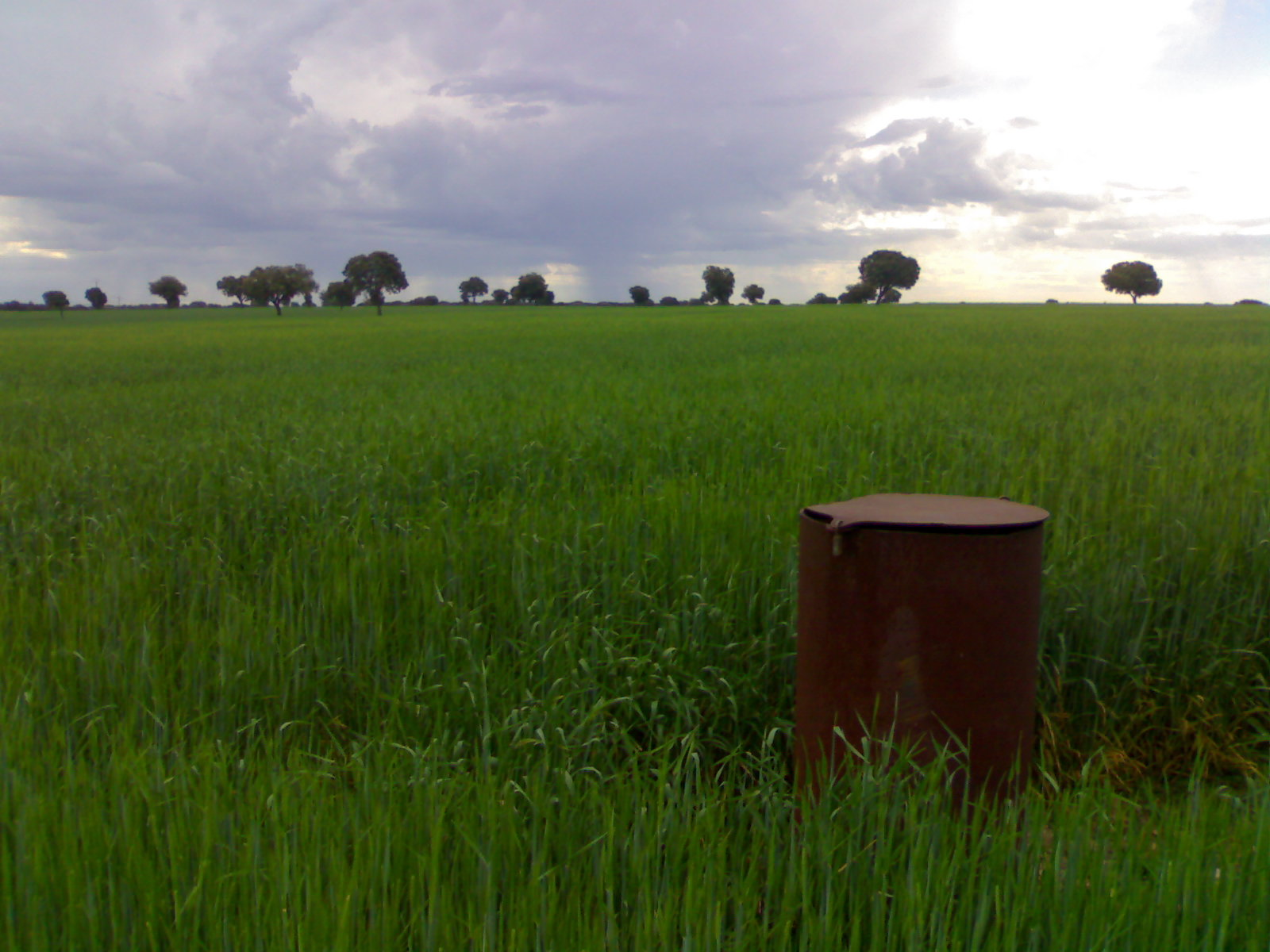 Landscape in La Alcarria - Castilla - Spain